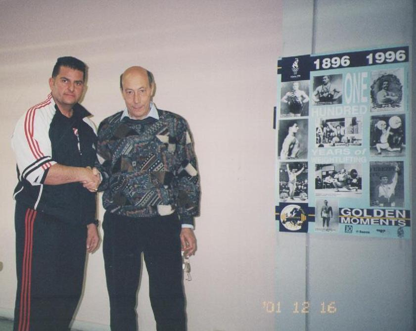 Paolo Tassetto con il Dr. Enrico Arcelli